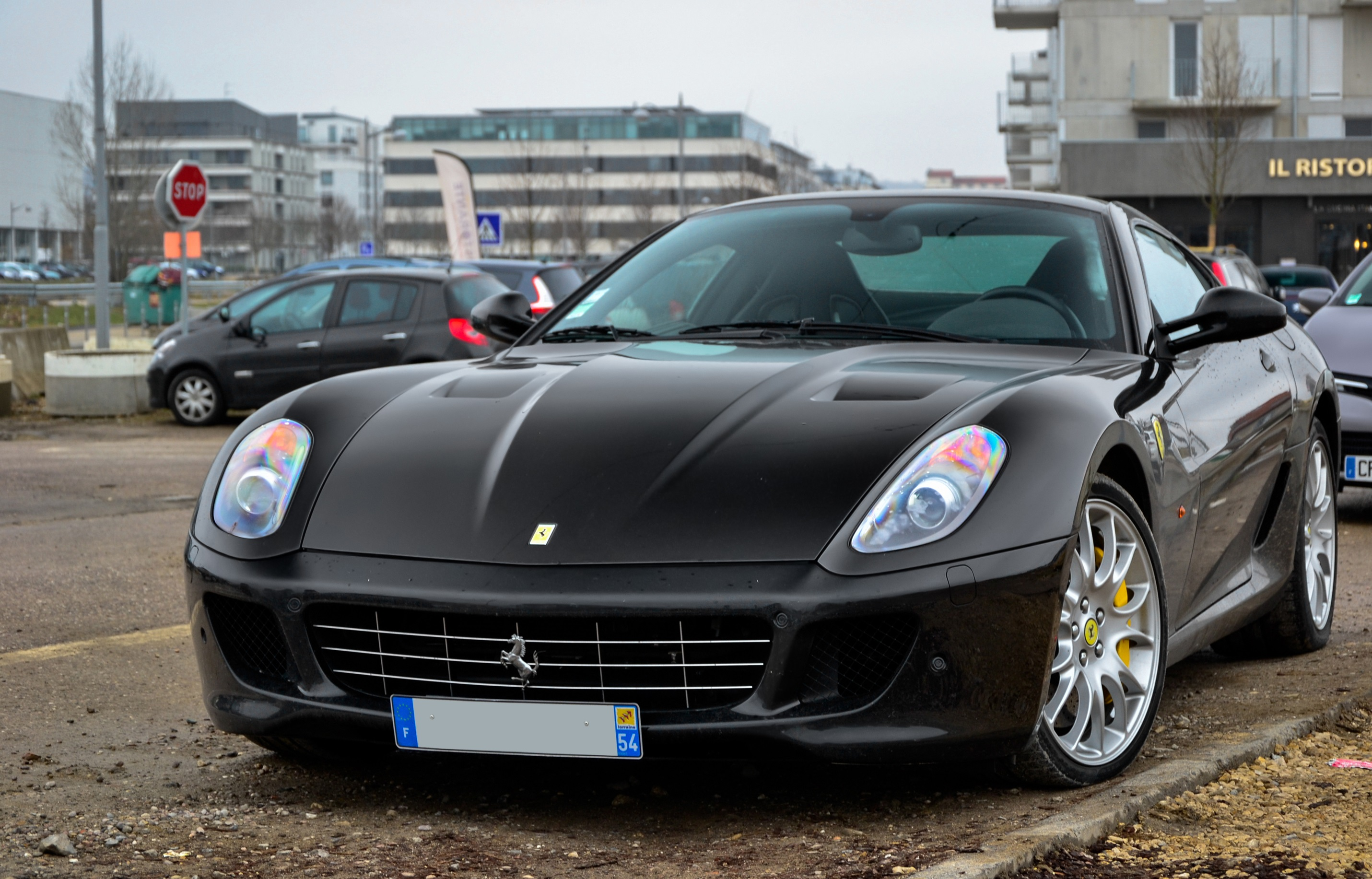 Una Ferrari 599 GTB Fiorano nera